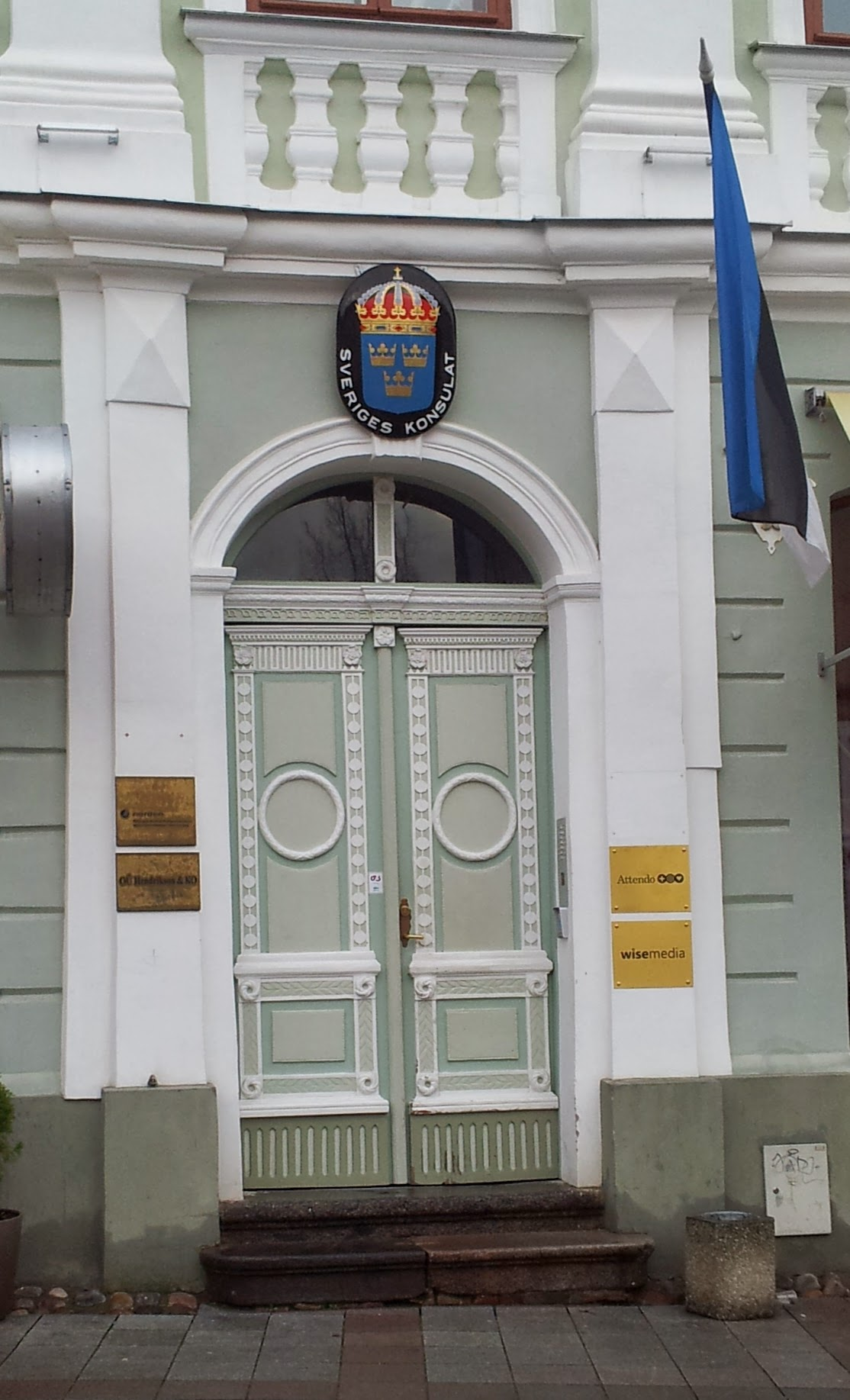 Sissepääs Rootsi aukonsulaati Tartus